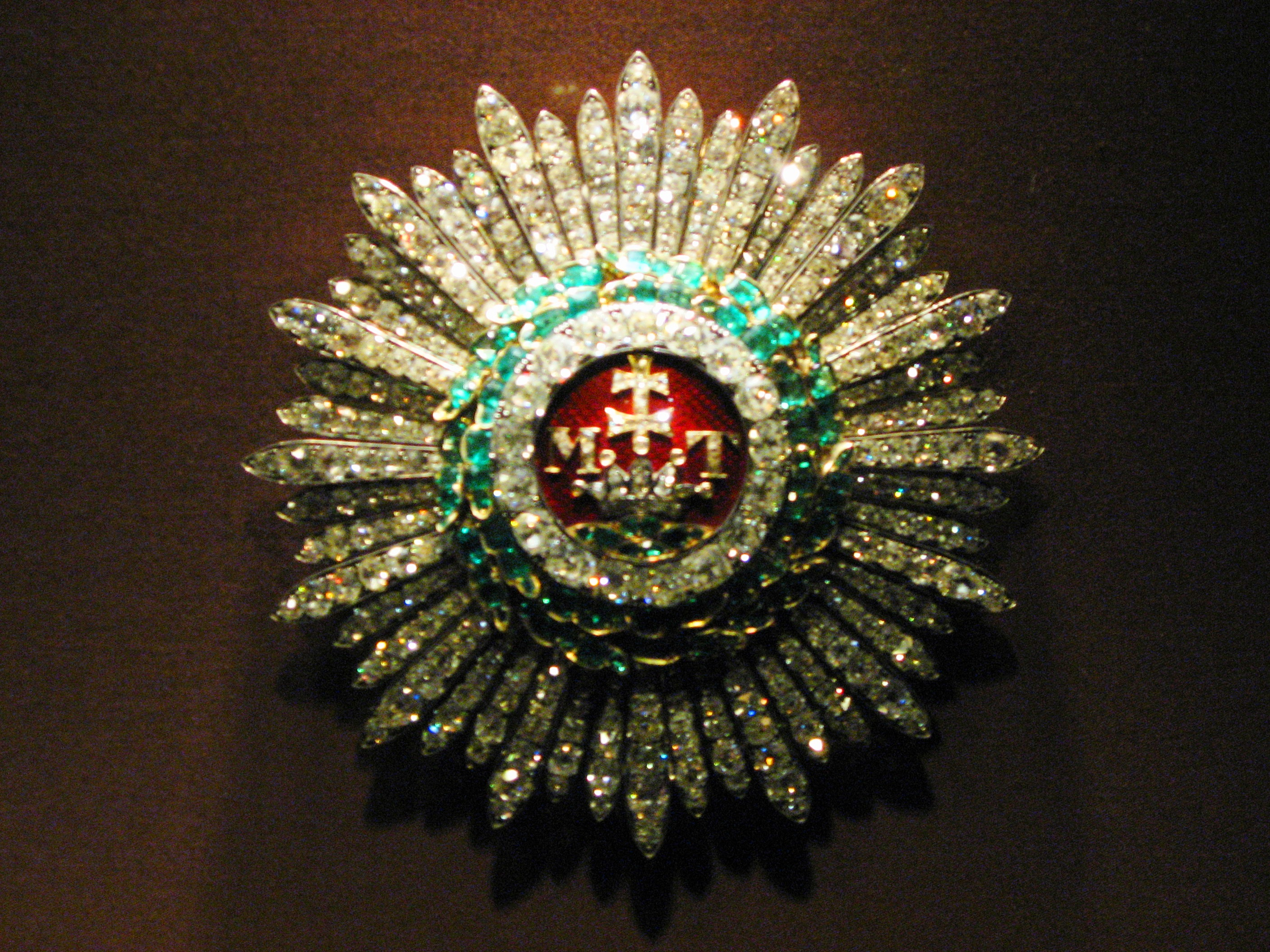 Stern und Kreuz des ungarischen St. Stephans-Ordens. J. und A. Biedermann; Wien, 1. Hälfte des 19. Jahrhunderts. Gold, Silber, Diamanten, Smaragde, Email. Inv. Nr. XIa 20.